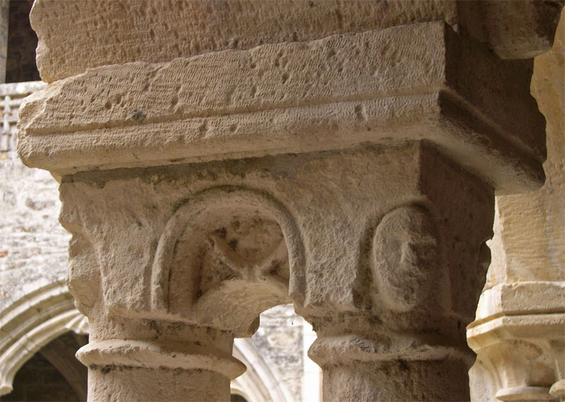 Priorat de Carennac. Capitells del claustre. Òlt, França